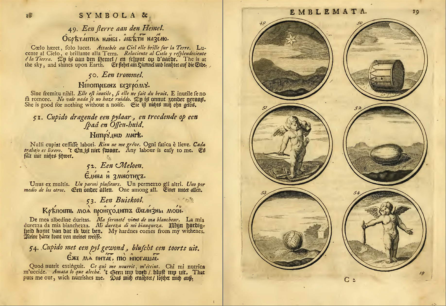 «Избранные емблемы и символы на российском, латинском, французском, немецком и английском языках объясненные, прежде в Амстердаме, а потом во граде Св. Петра 1788 года, с приумножением изданные Статским Советником Нестором Максимовичем Амбодиком»